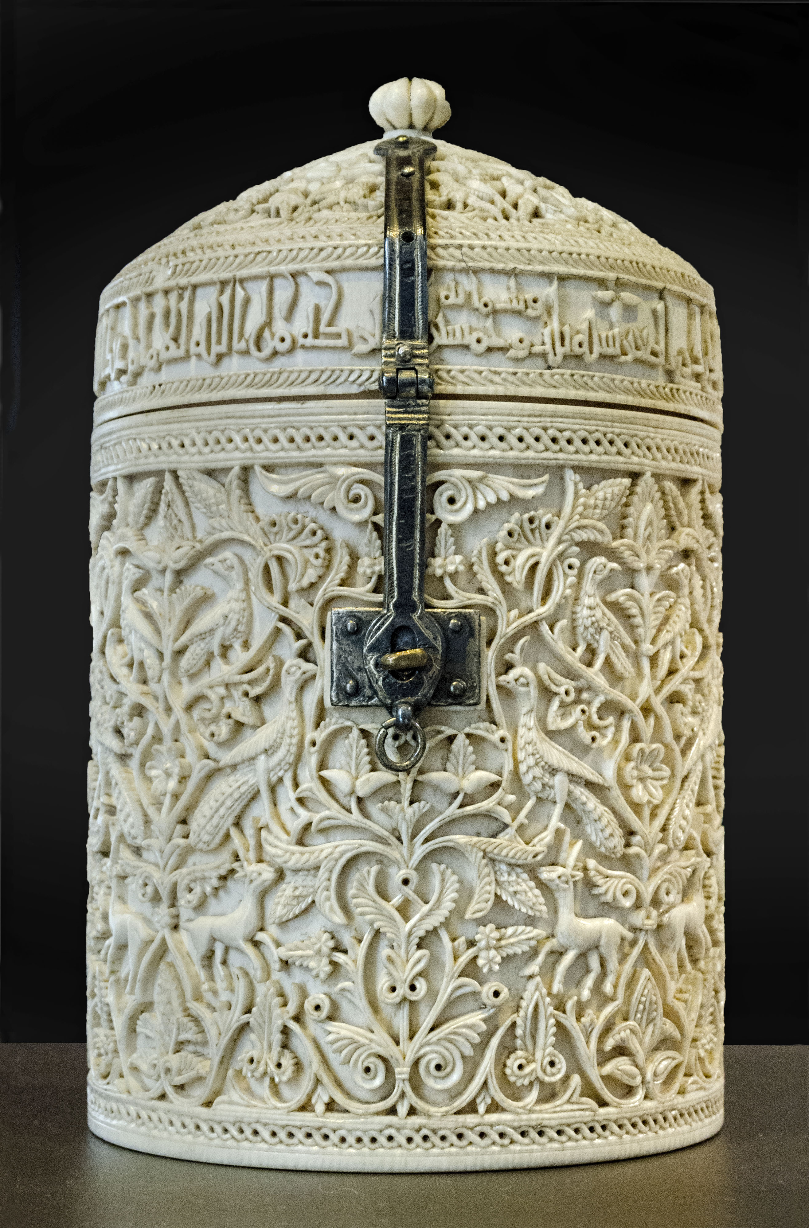 Es una arqueta en marfil de unos 18 cm de altura con varias inscripciones, entre ellas la que señala que fue un regalo de Alhaquen II, segundo califa omeya de Córdoba, para una favorita. Su superficie está decorada con motivos vegetales y animales. Procede de la catedral de Zamora aunque su origen es islámico. Está datada entre los años 900 y 964.